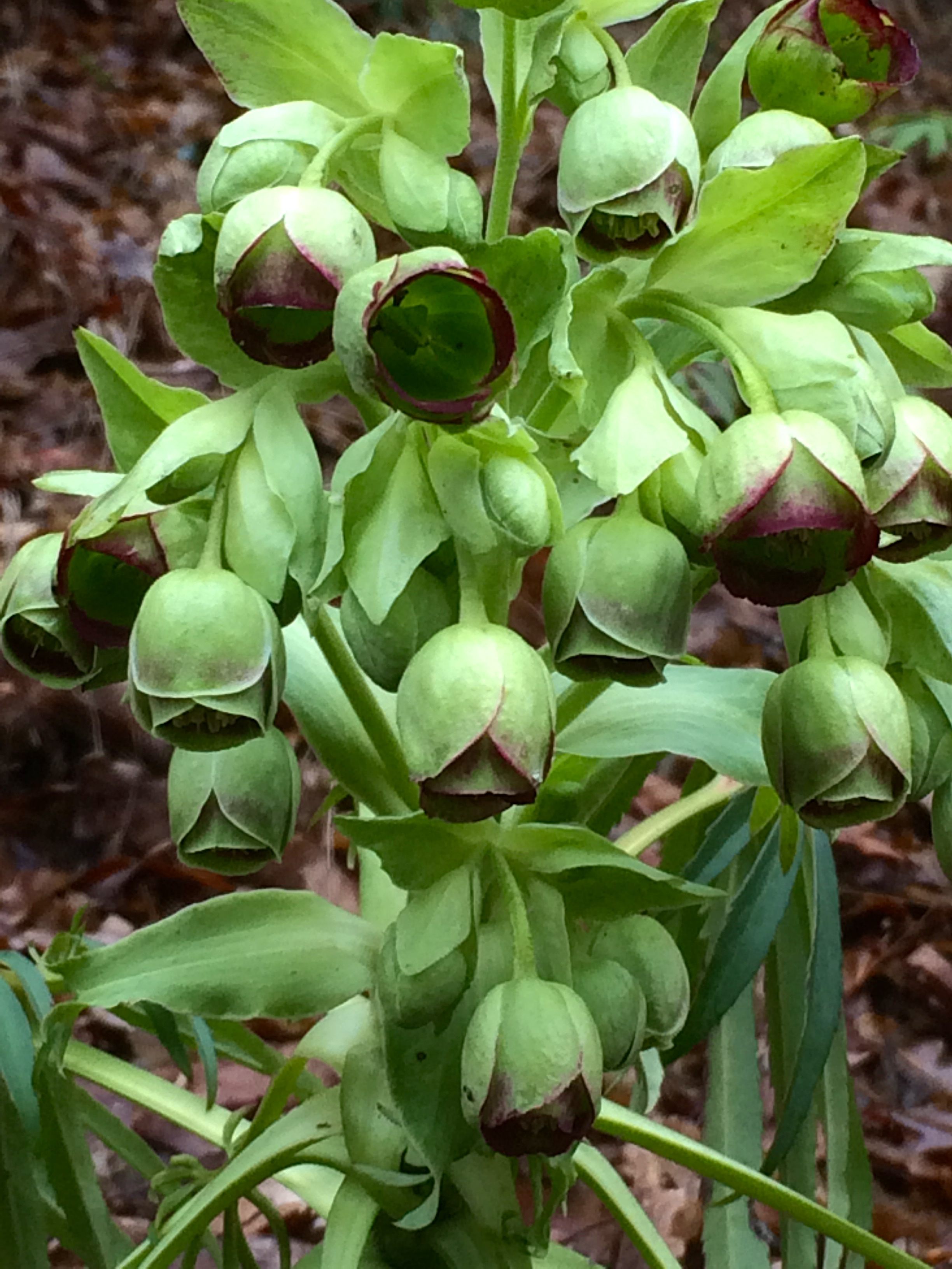 Helleborus foetidus - Bestand entlang der B54 bei Bad Schwalbach (gut sichtbar von der Straße - Parkplatz ausgeschildert); Pflanze ist streng an Kalk gebunden, wird in der Homöopathie genutzt